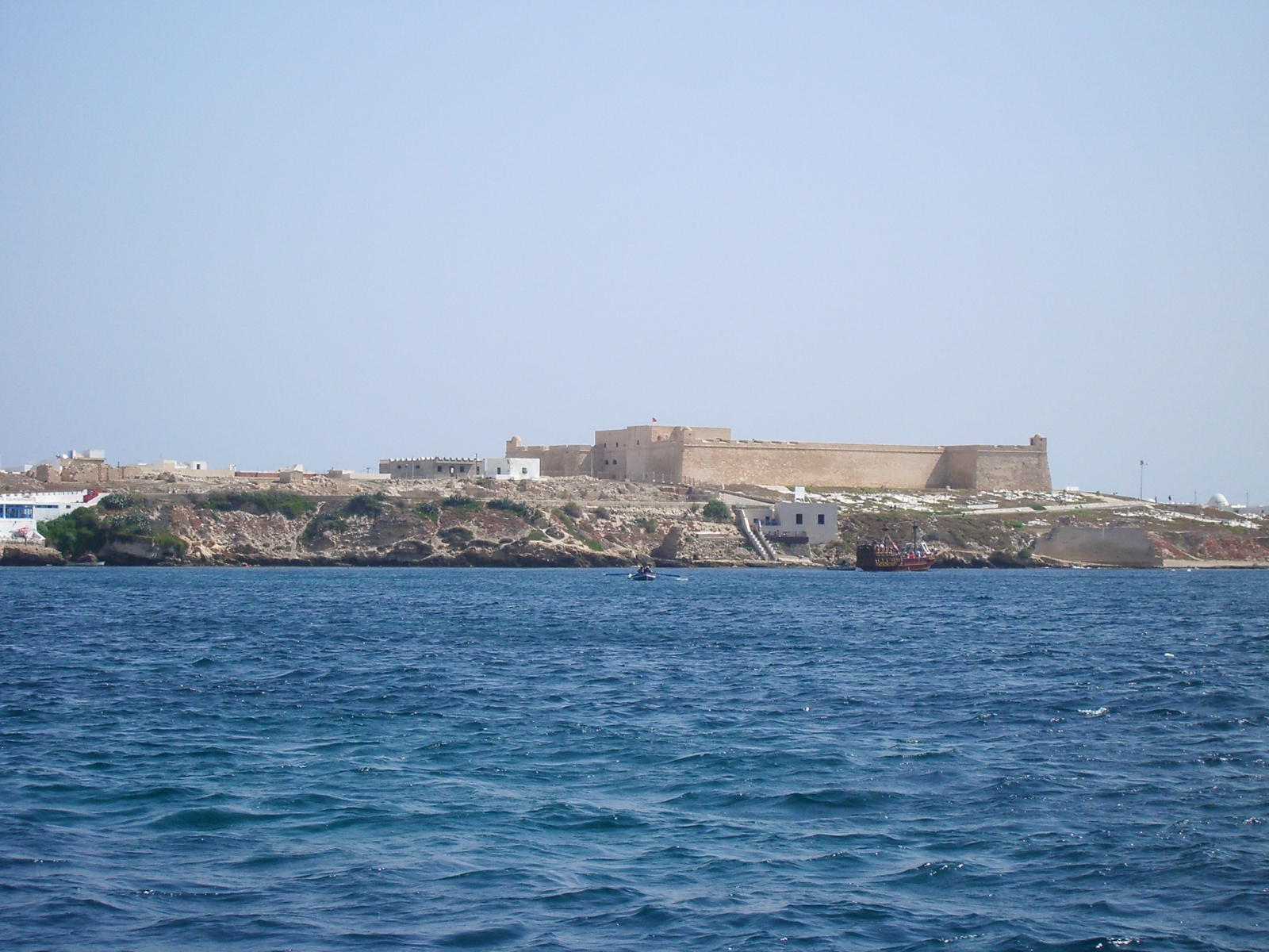 Bordj el Kebir